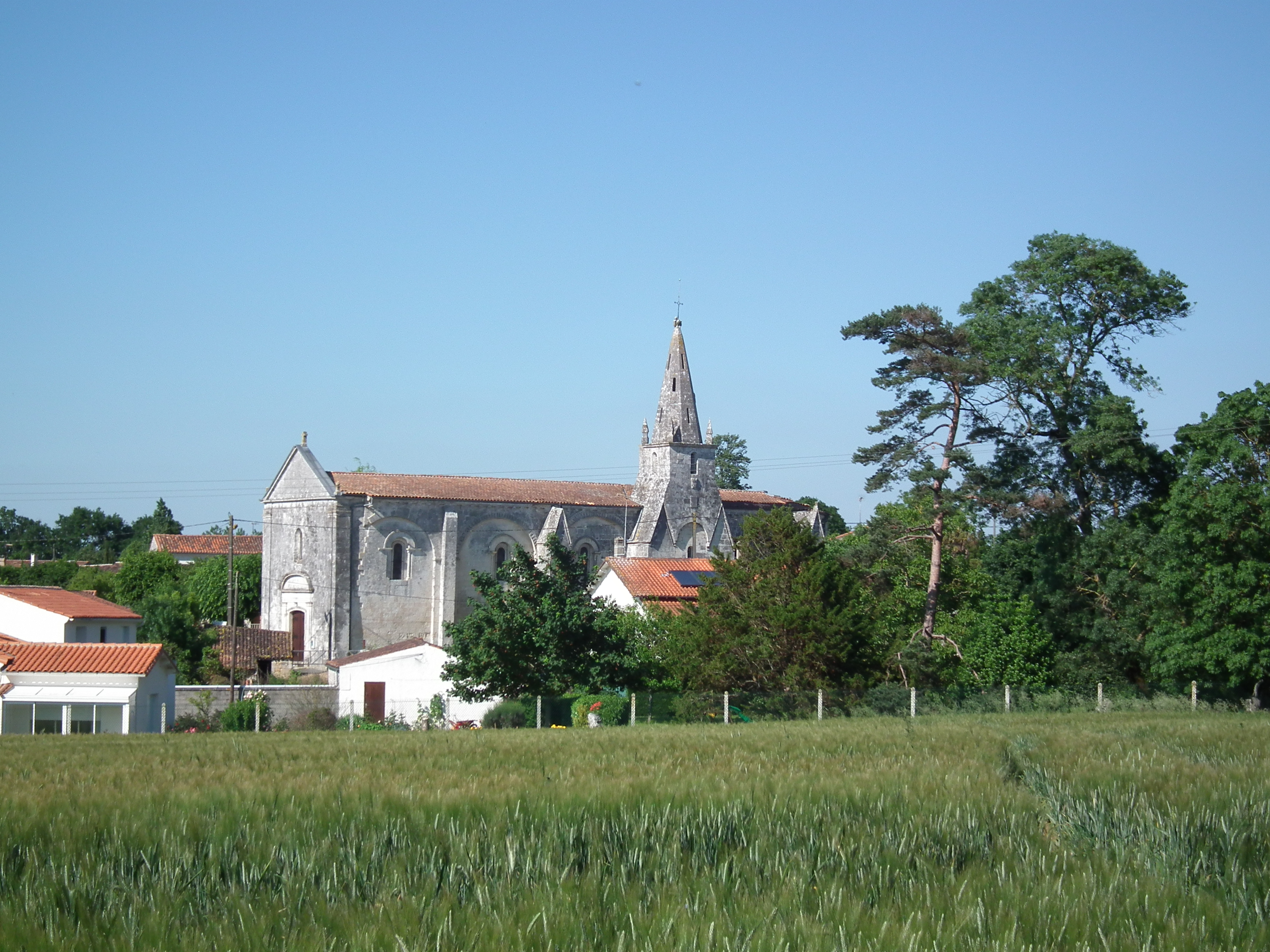 Le village de Plassay